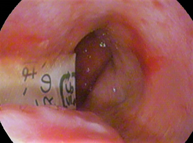 食道異物。PTP。鉗子で把持できたので、そのまま引っ張り出す / Foreign body in esophagus_PTP